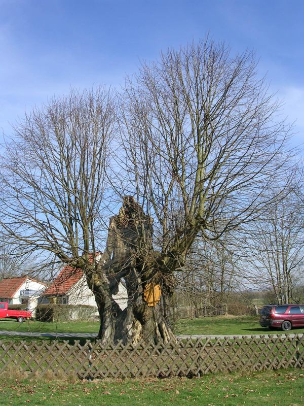 Gerichtslinde in Pöhlde (Naturdenkmal ND OHA00016 im Landkreis Osterode am Harz; seit 2016 LK Göttingen)